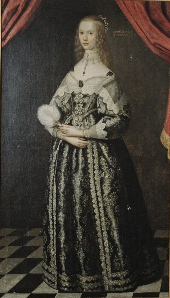 Porträtt föreställande Maria Sofia De La Gardie målat av Jakob Henrik Elbfas